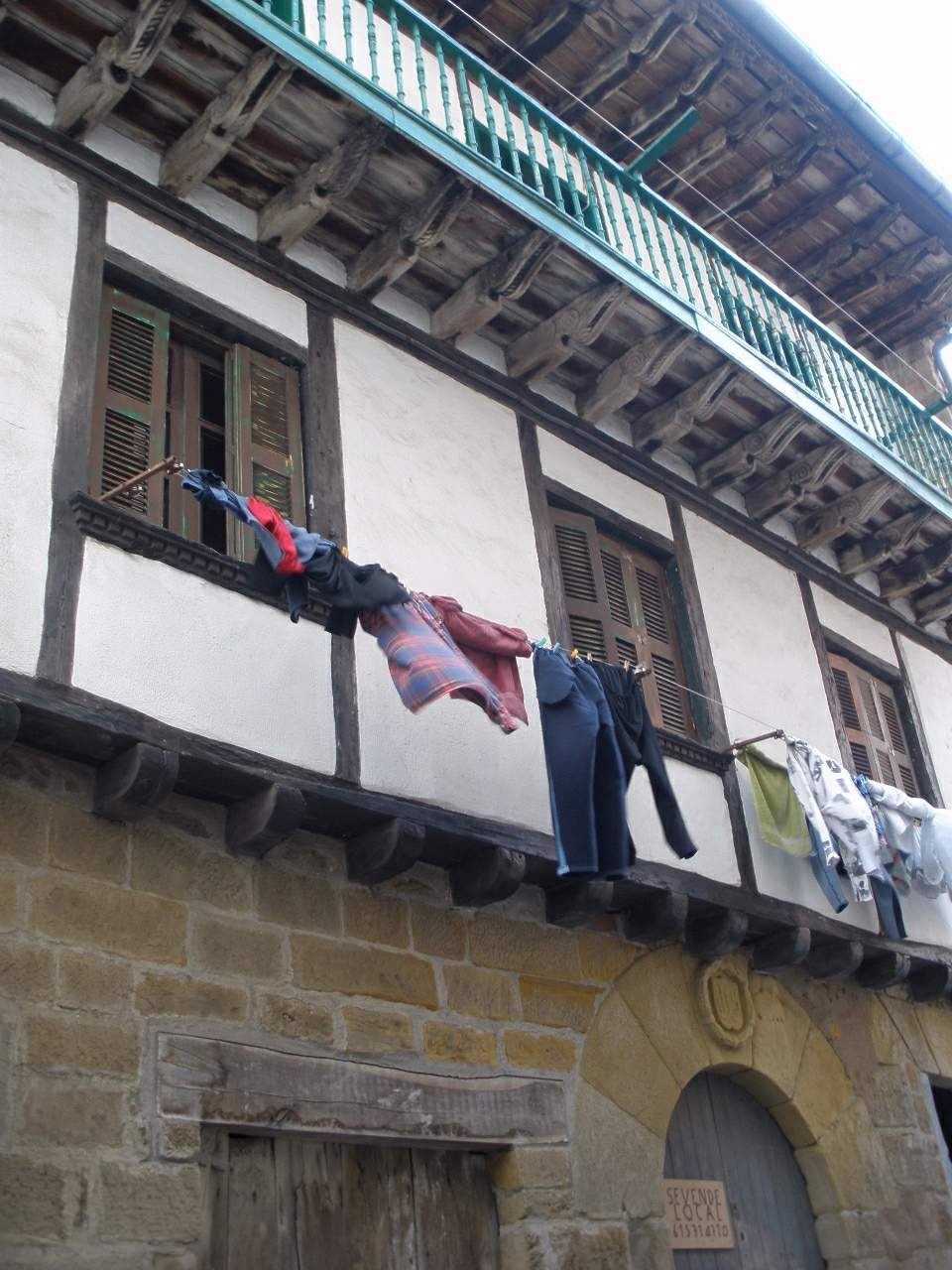 Orio (Gipuzkoa)